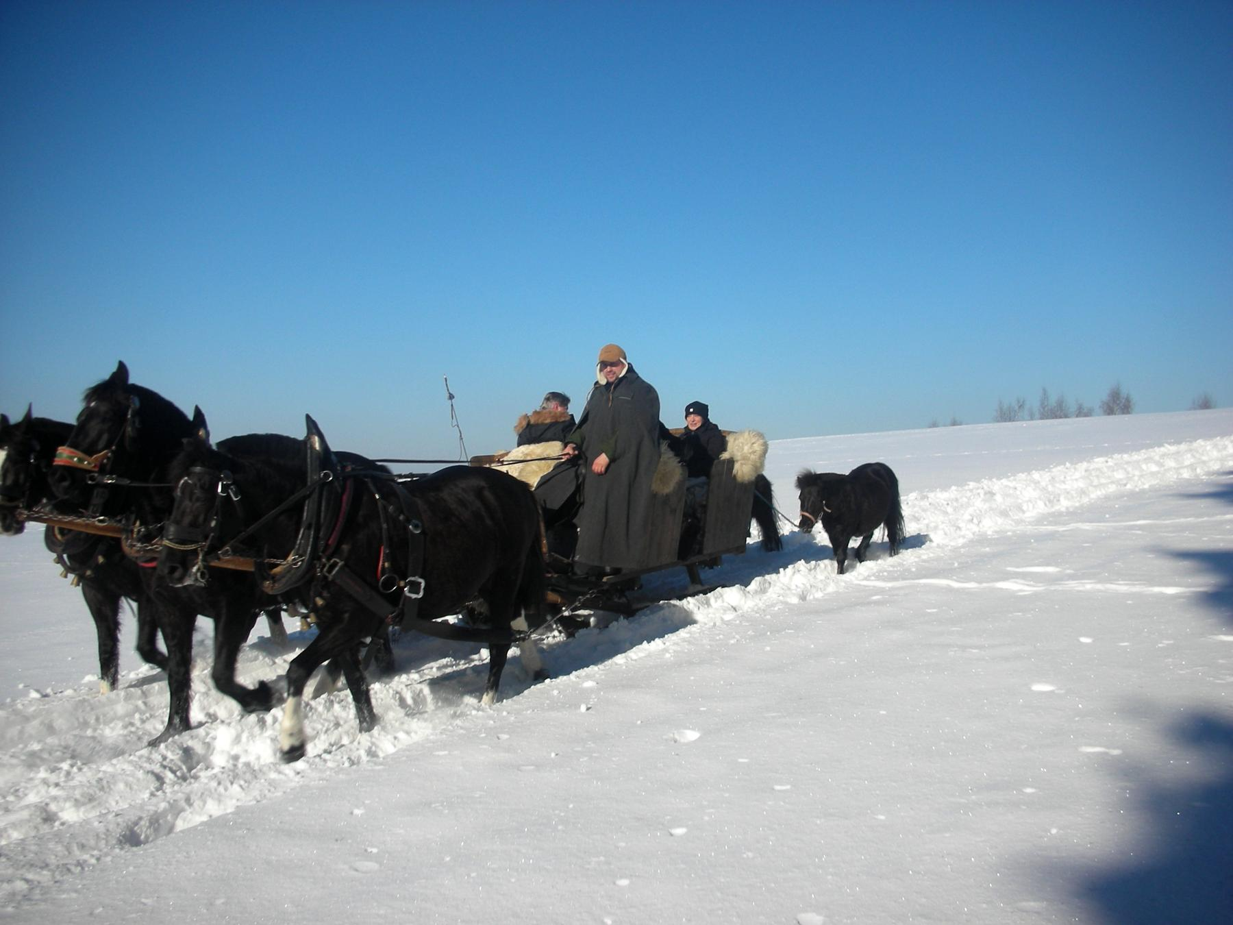 Pferdeschlitten in Erlbach im Vogtland